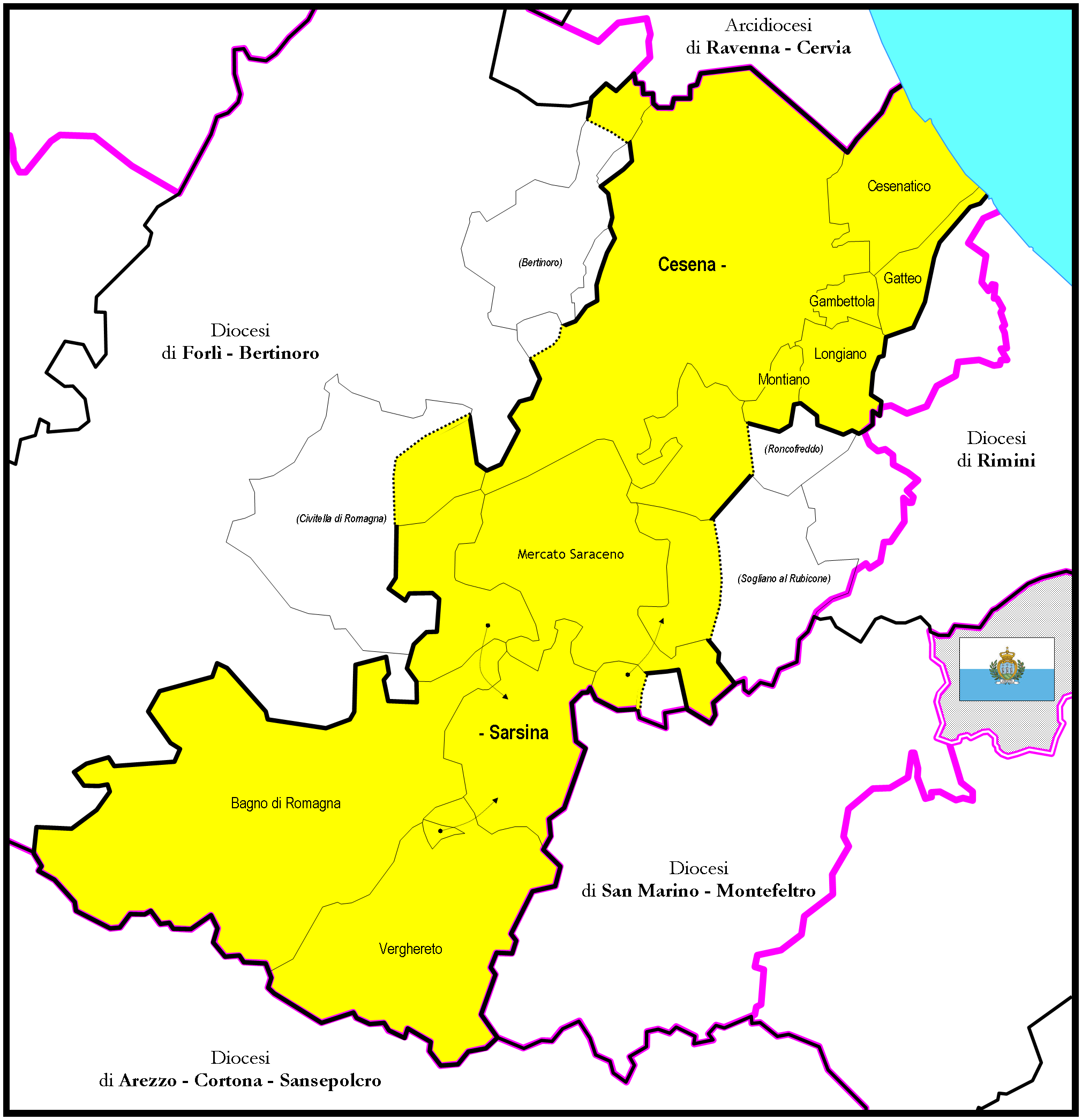 Mappa della Diocesi di Cesena - Sarsina